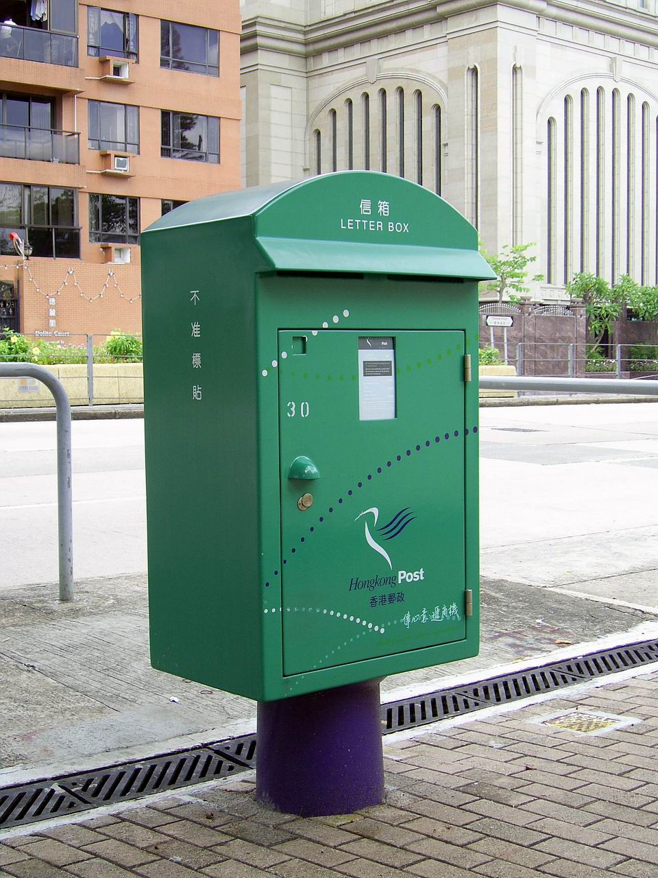 香港郵政郵箱